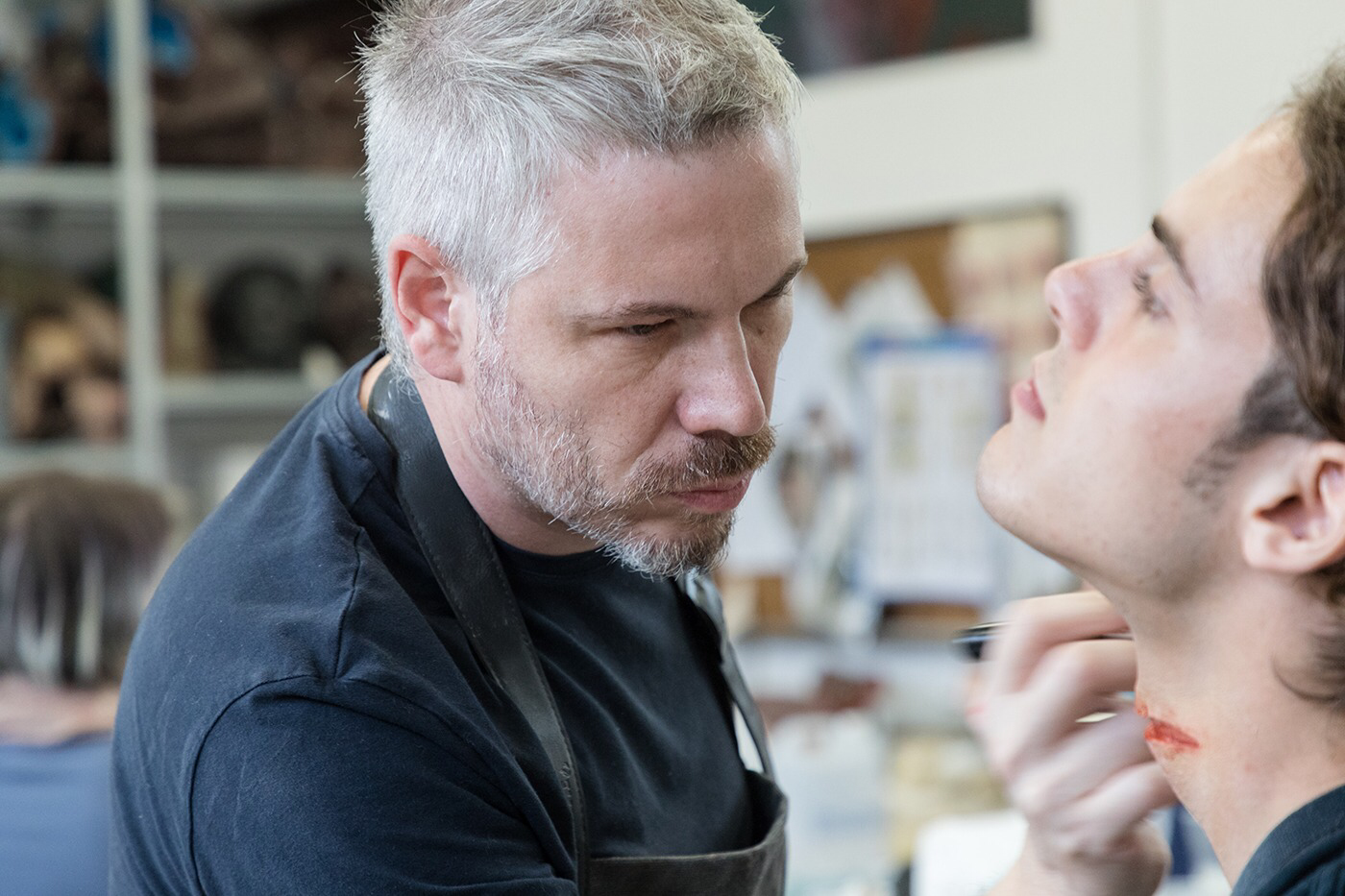 Leonardo Cruciano nel 2019, mentre lavora negli studi di Makinarium a Cinecittà.